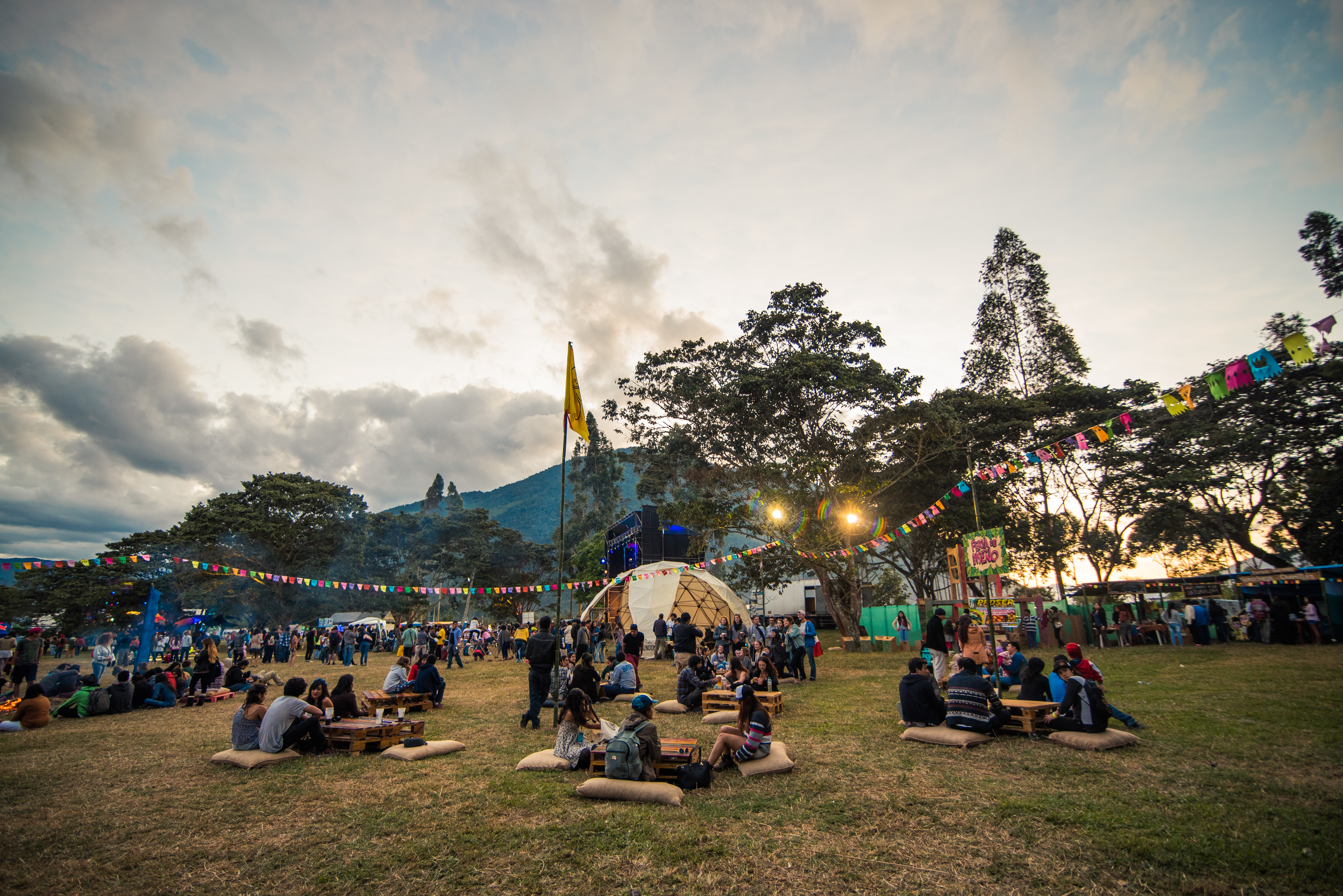 El Festival Selvámonos en Oxapampa